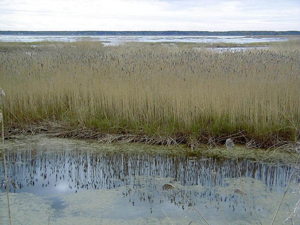 Babītes ezers pie Spuņciema 2001-05-13